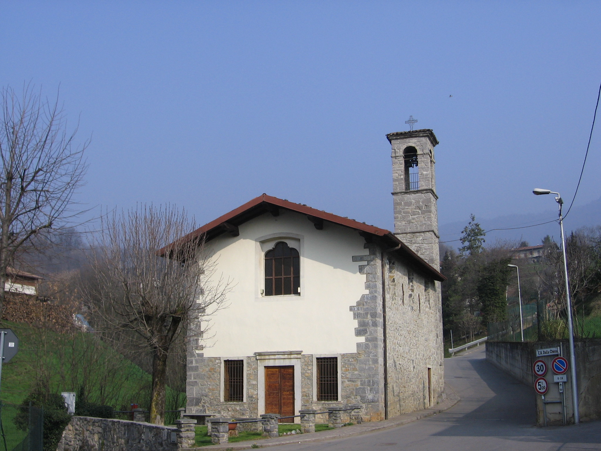 Fiorano al Serio, Bergamo, Italia